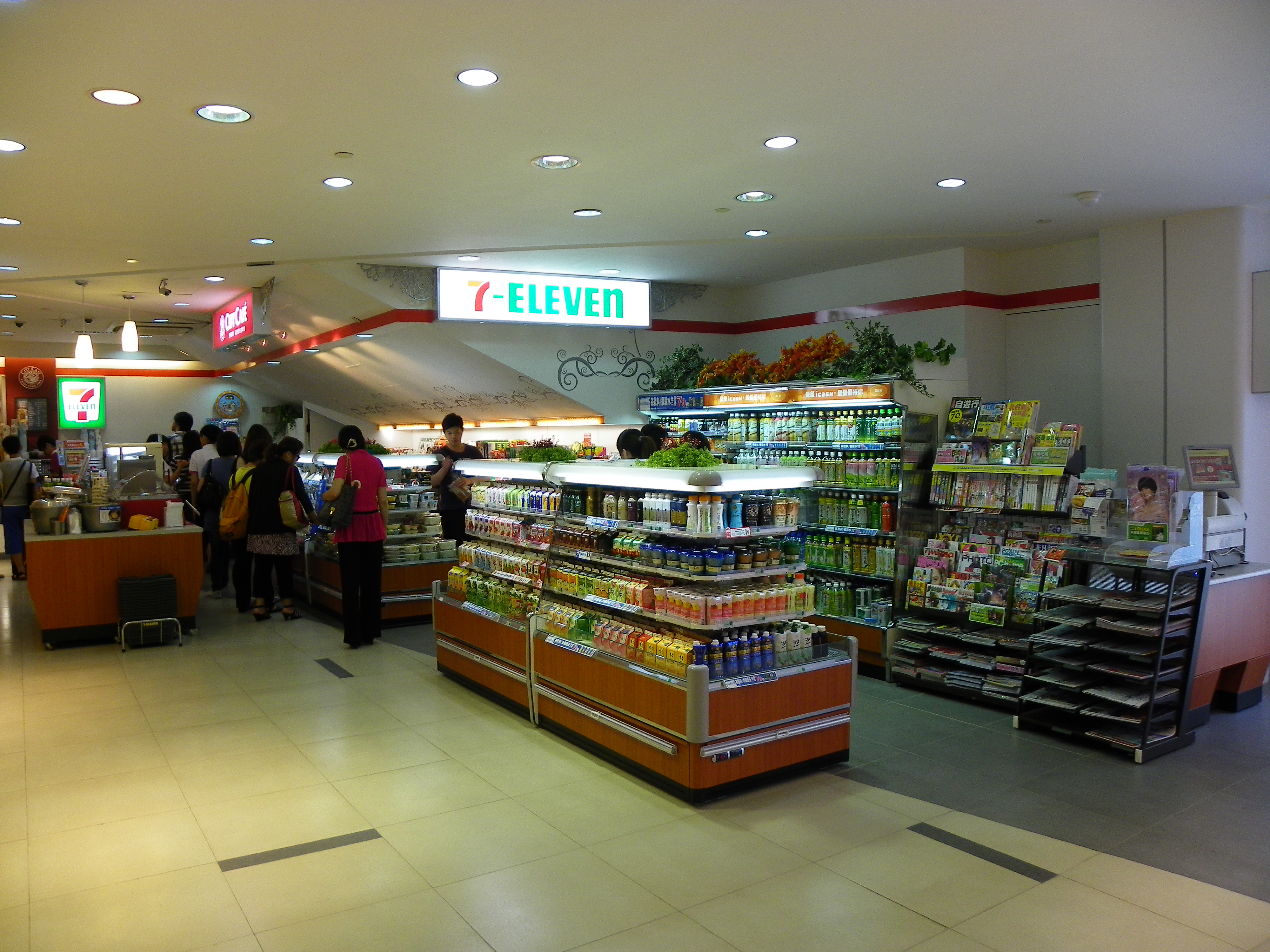 位於臺北市市府轉運站的統一超商市捷門市（店號990721），地址：臺北市信義區忠孝東路五段6號1樓。